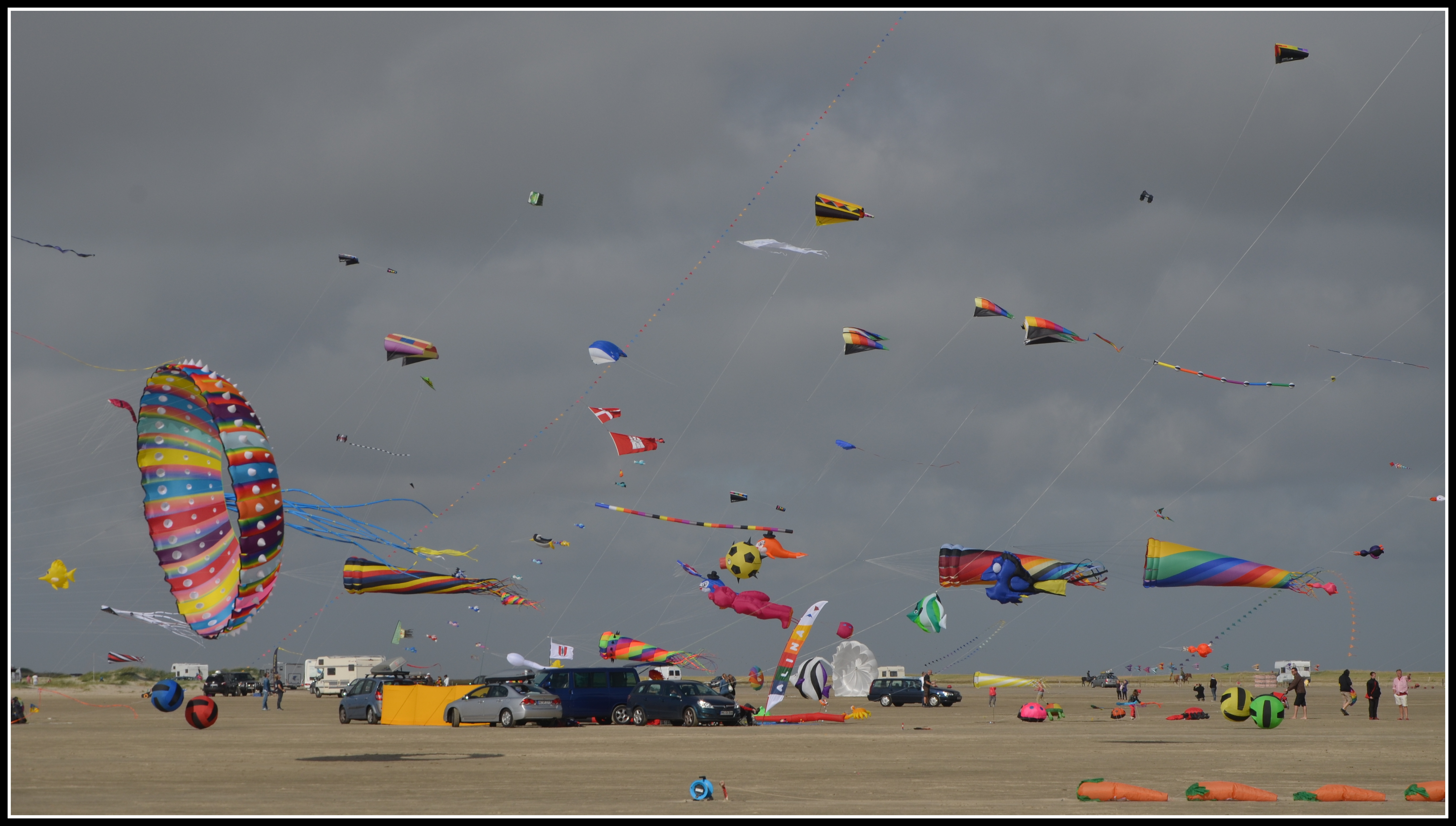 Dragefestival på Rømø